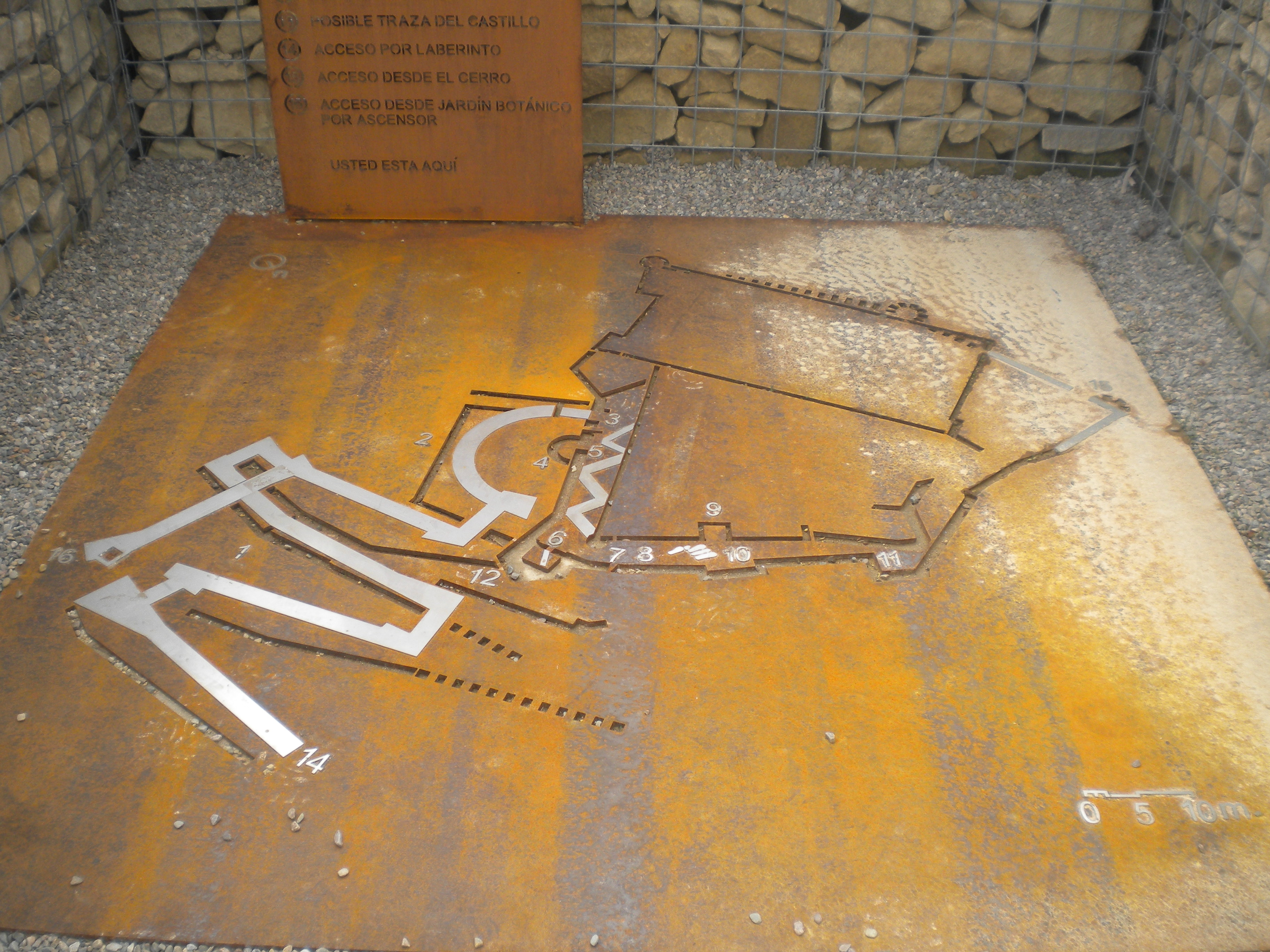 Plano del Castillo de Miranda de Ebro (Castilla y León, España)